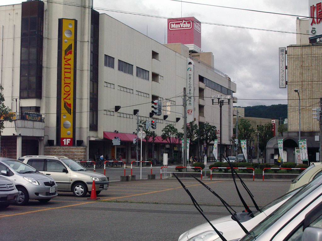 横手駅駅前